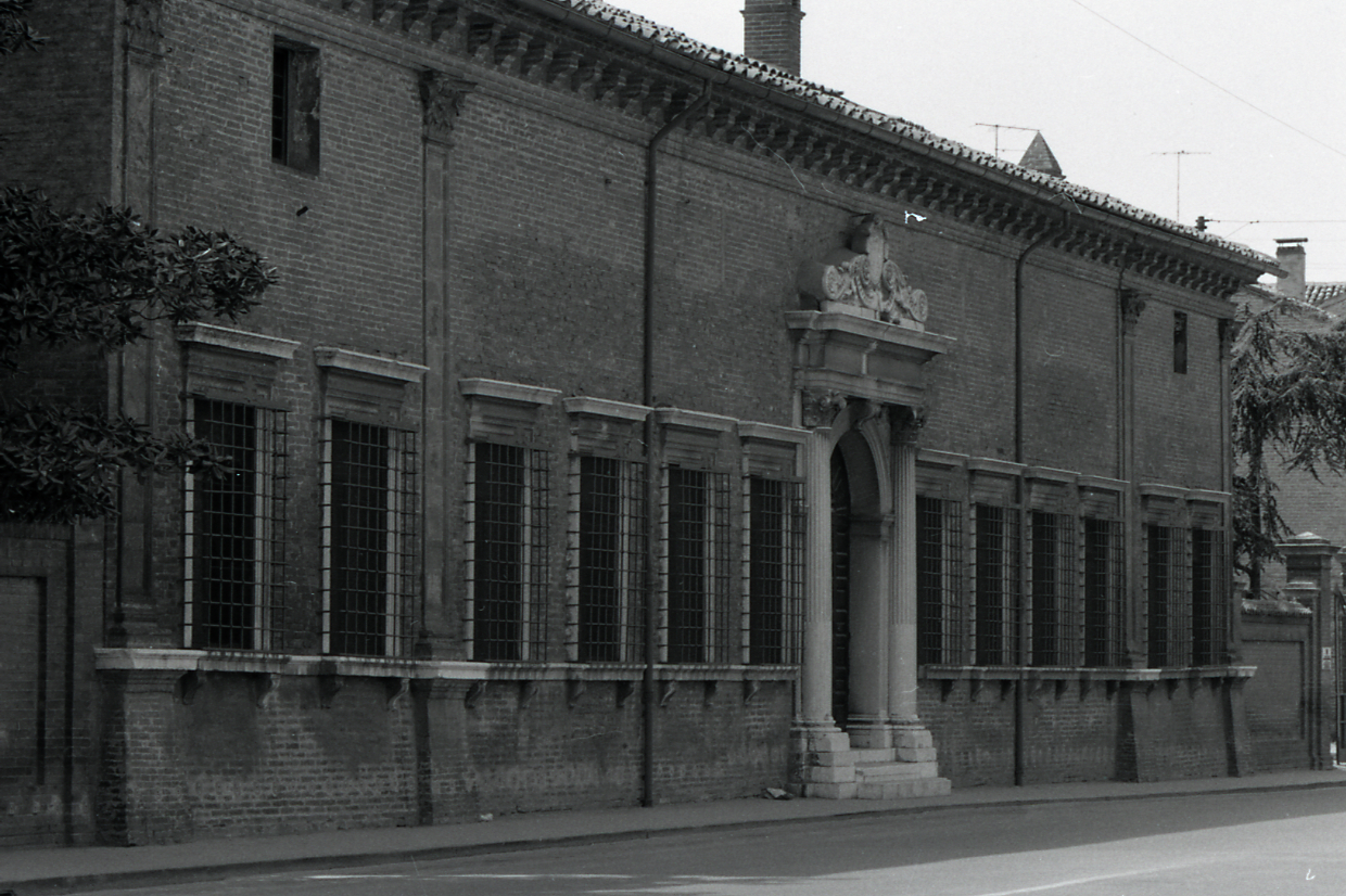 Servizio fotografico : Ferrara, 1969 / Paolo Monti. - Strisce: 7, Fotogrammi complessivi: 38 : Negativo b/n, gelatina bromuro d'argento/ pellicola ; 35 mm. - ((I fotogrammi hanno una doppia numerazione. . - Sul portanegativi: Nikon FP4. - Sul dorso del portanegativi Monti specifica: "Alberi". - Occasione: Documentazione per la pubblicaizone di: "Renzo RENZI (a cura di), Ferrara, Bologna, Edizioni Alfa, 1969". - Fonte: Agenda di Paolo Monti: Monti/ 3 aprile 1966 - 9 marzo 1971/ 12421-16823 (1966-1971), presso Archivio Paolo Monti. - Fonte: Monografia di Renzi, Renzo: Ferrara, Bologna, Edizioni Alfa (1969). - Fonte: Agenda di Paolo Monti: Monti - Agenda 1969 (1969), presso Archivio Paolo Monti